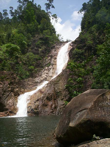 Main Berkelah Fall, Pahang, Malaysia, picture by Jan Stuivenberg Main Berkelah Fall, Pahang, Malaysia, picture by Jan Stuivenberg